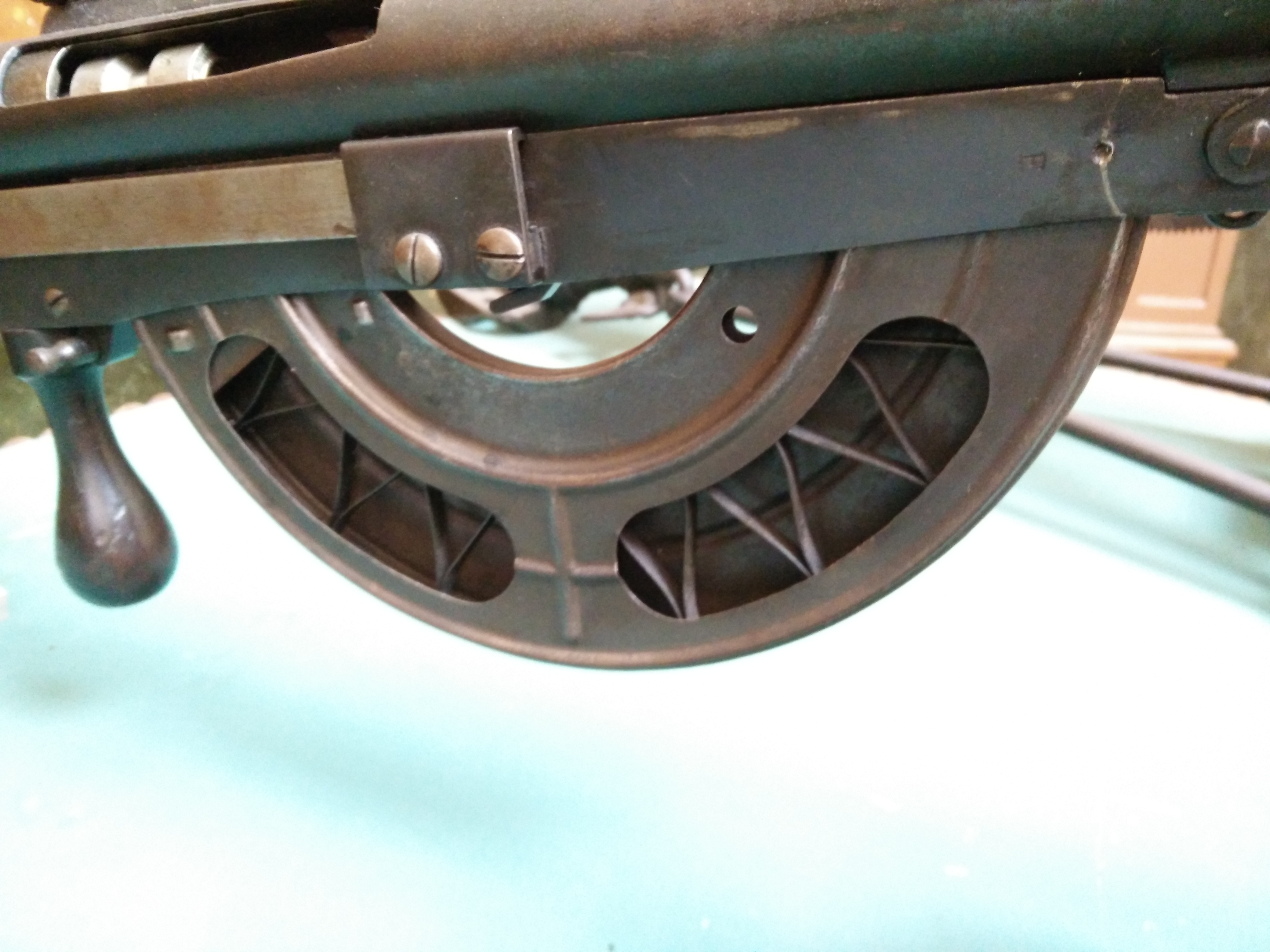 Nabojnik francoskega mitraljeza Chauchat